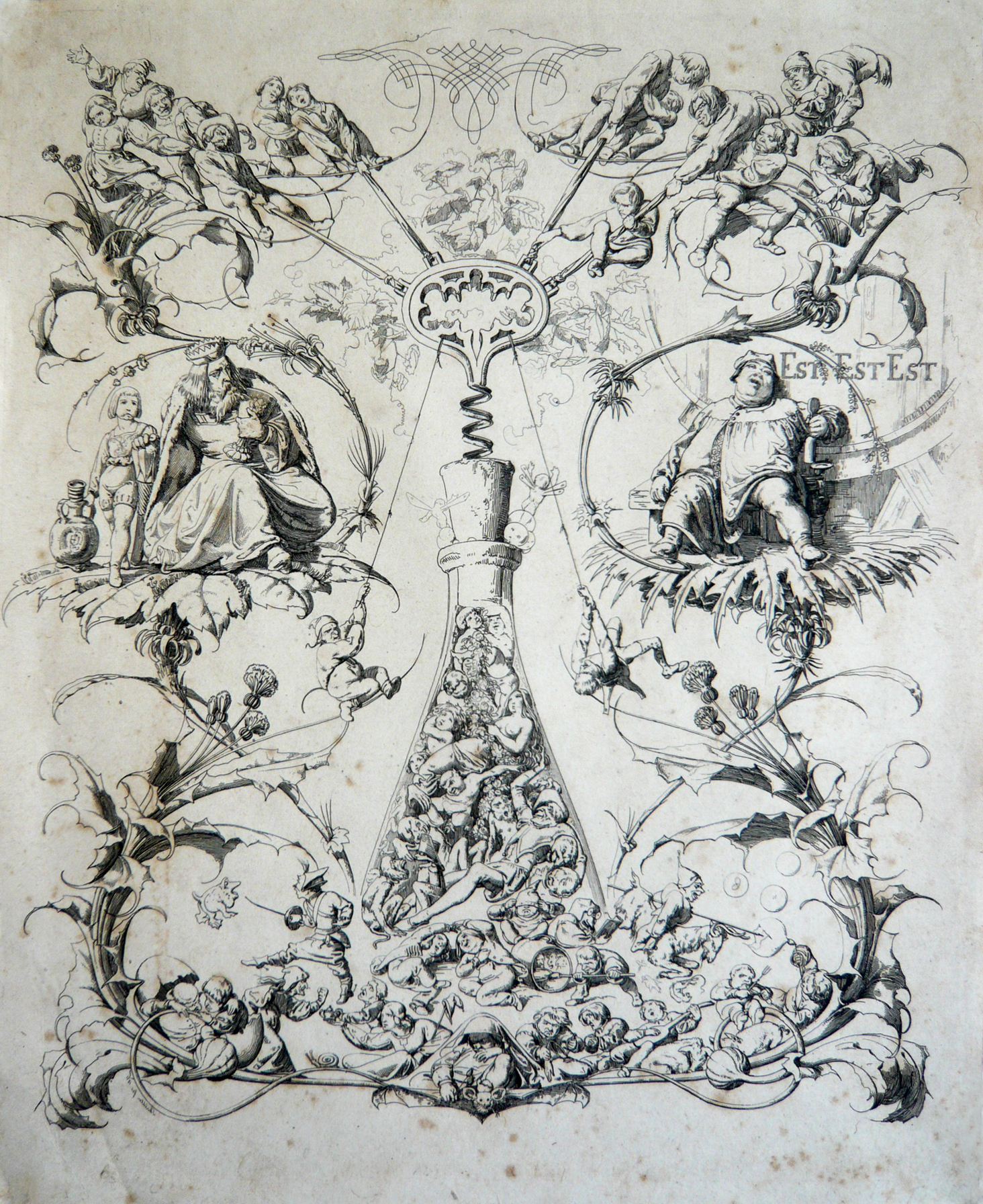 Adolf Schrödter, Est Est Est, 1851: Adolph Schroedter, ausgebildeter Kupferstecher, wurde ab 1829 in Düsseldorfer Kunstakademie unterrichtet. Hier wurde er schnell der angesehenste Maler auf dem Gebiet des Genres und es war das wahre Leben, das ihn faszinierte, seis' trinkend im Wirtshaus oder tanzend beim Bauernfest. Mit einem kleinen Korkenzieher statt seinem Namen signierte er seine Bilder.